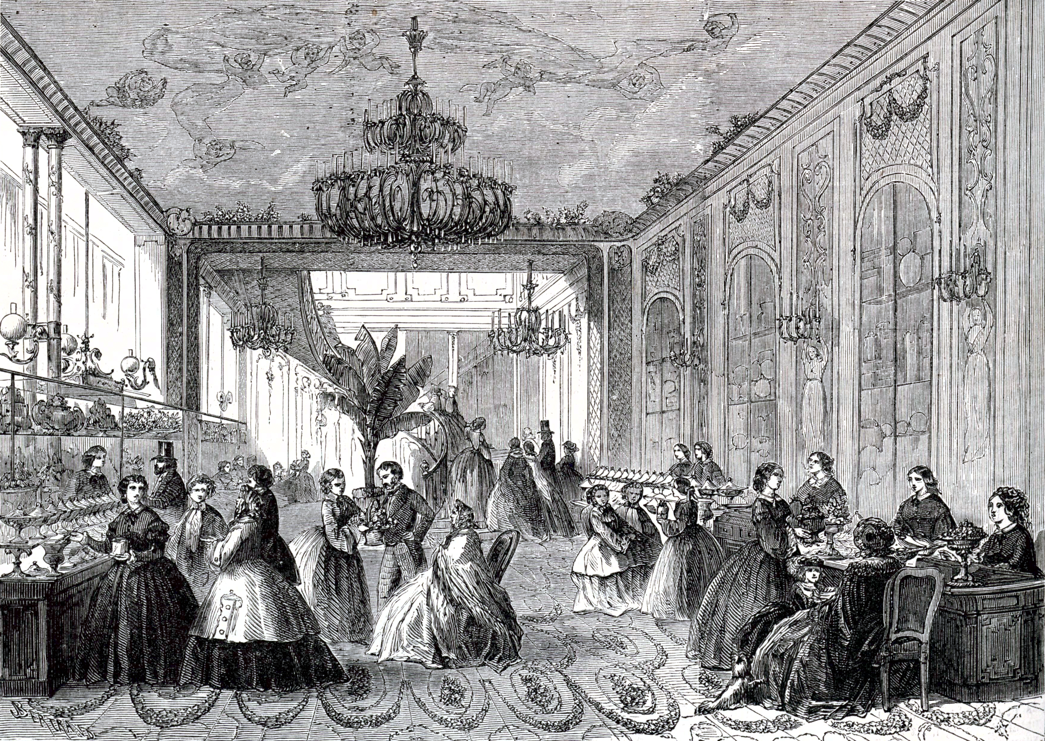 Gravure dans Le Monde illustré, n°